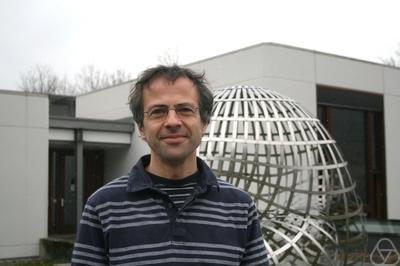 Foto di Gábor Tardos